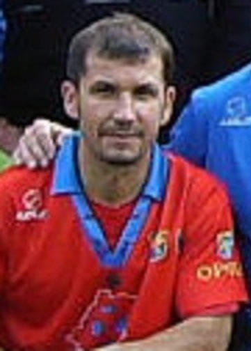 Polski piłkarz